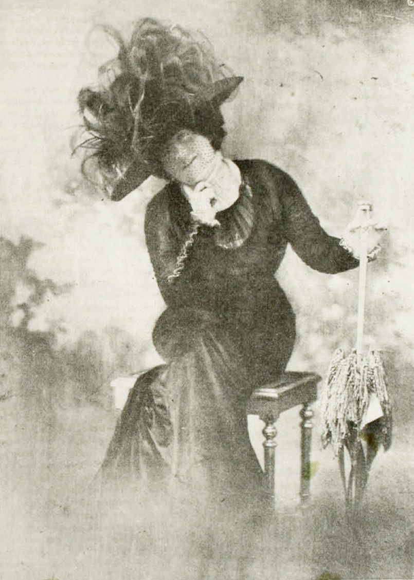 "Retrato moderno de la distinguida dama" Doña Delia Matte de Izquierdo.